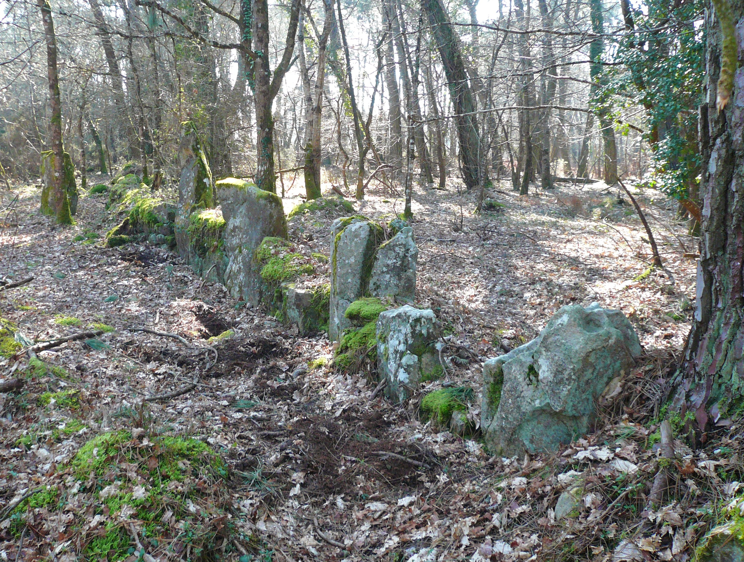 Alignement de menhirs, vestiges du cromlech nord de Kerlescan, commune de Carnac, Morbihan, Bretagne, France.